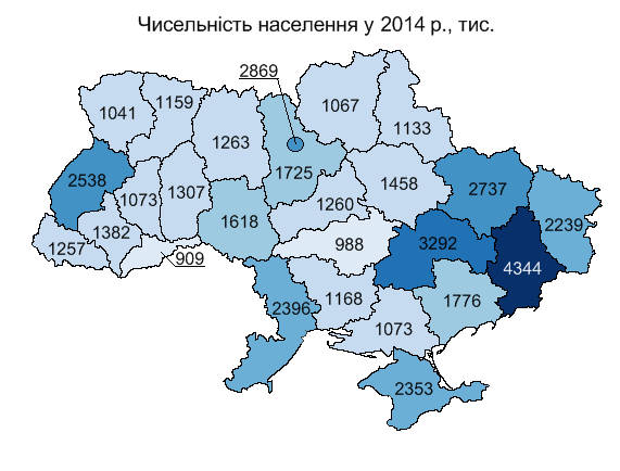 Населення регіонів України у 2014 р., тис. / Population of ukrainian regions in 2014